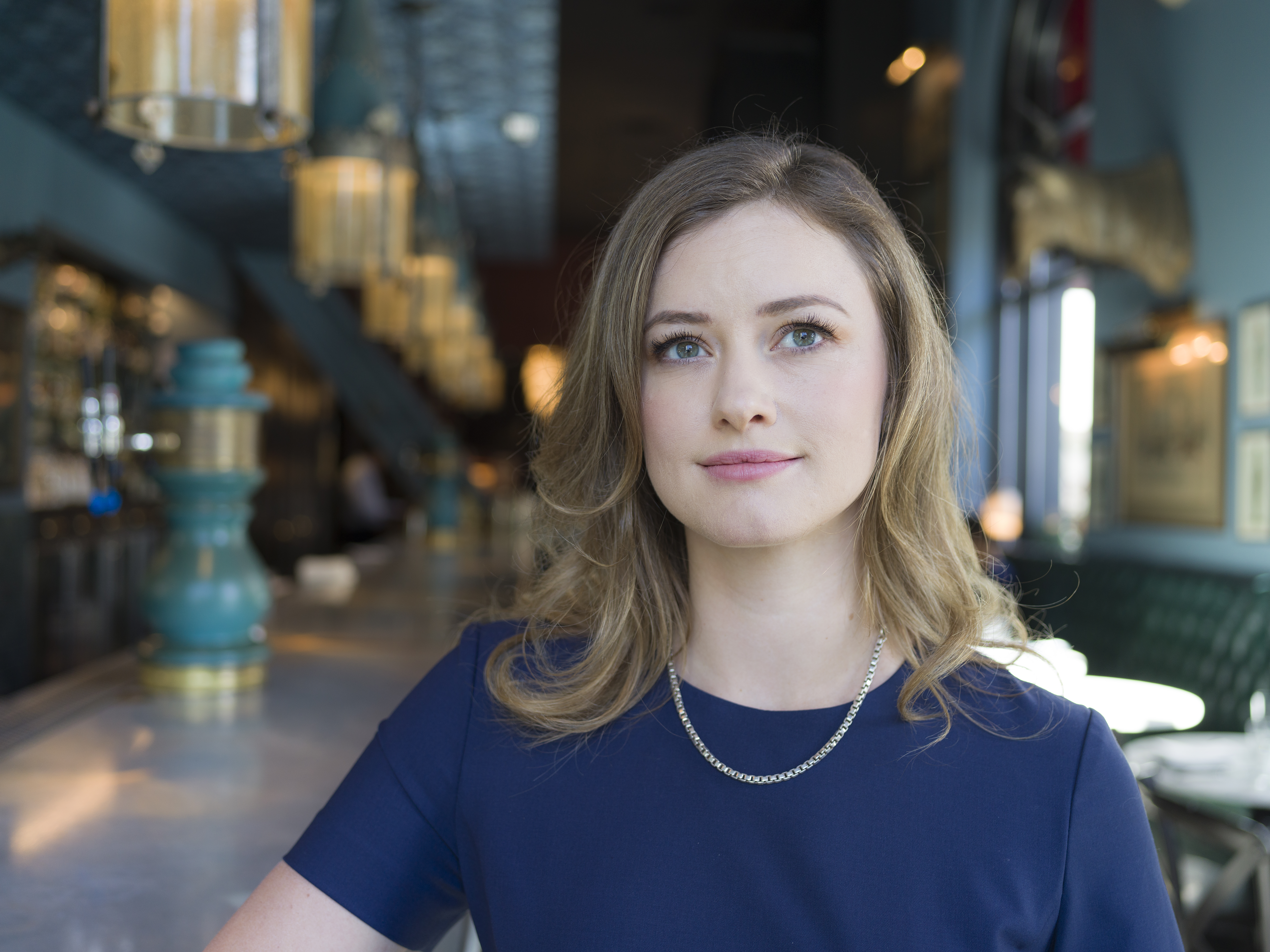 Jessica Scorpio in 2018.